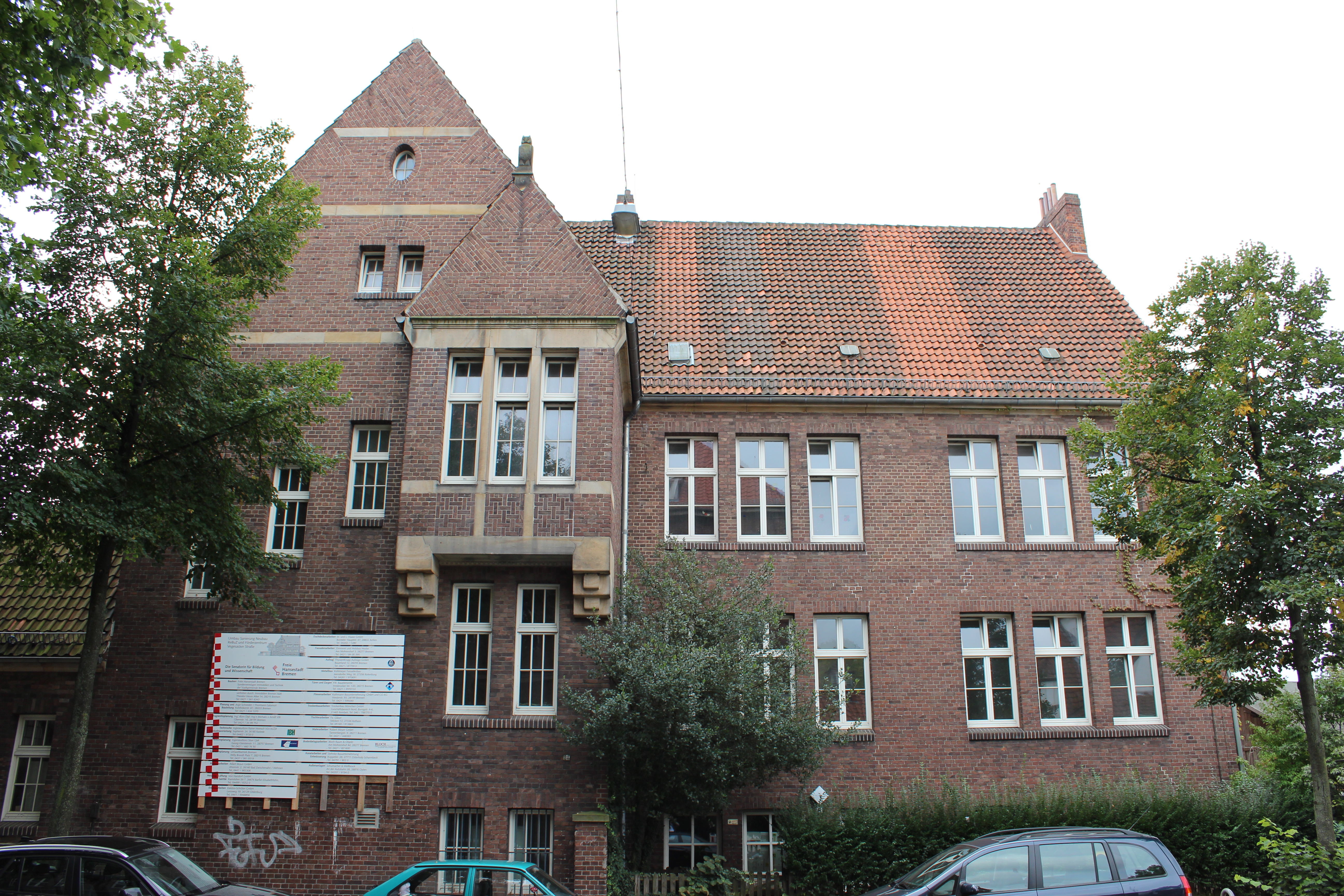 Hilfsschule, Sonderschule in Bremen, Vegesacker Straße 84.Das abgebildete Objekt ist ein geschütztes Kulturdenkmal in der Freien Hansestadt Bremen, mit der Nr. 1185 beim Landesamt für Denkmalpflege registriert.